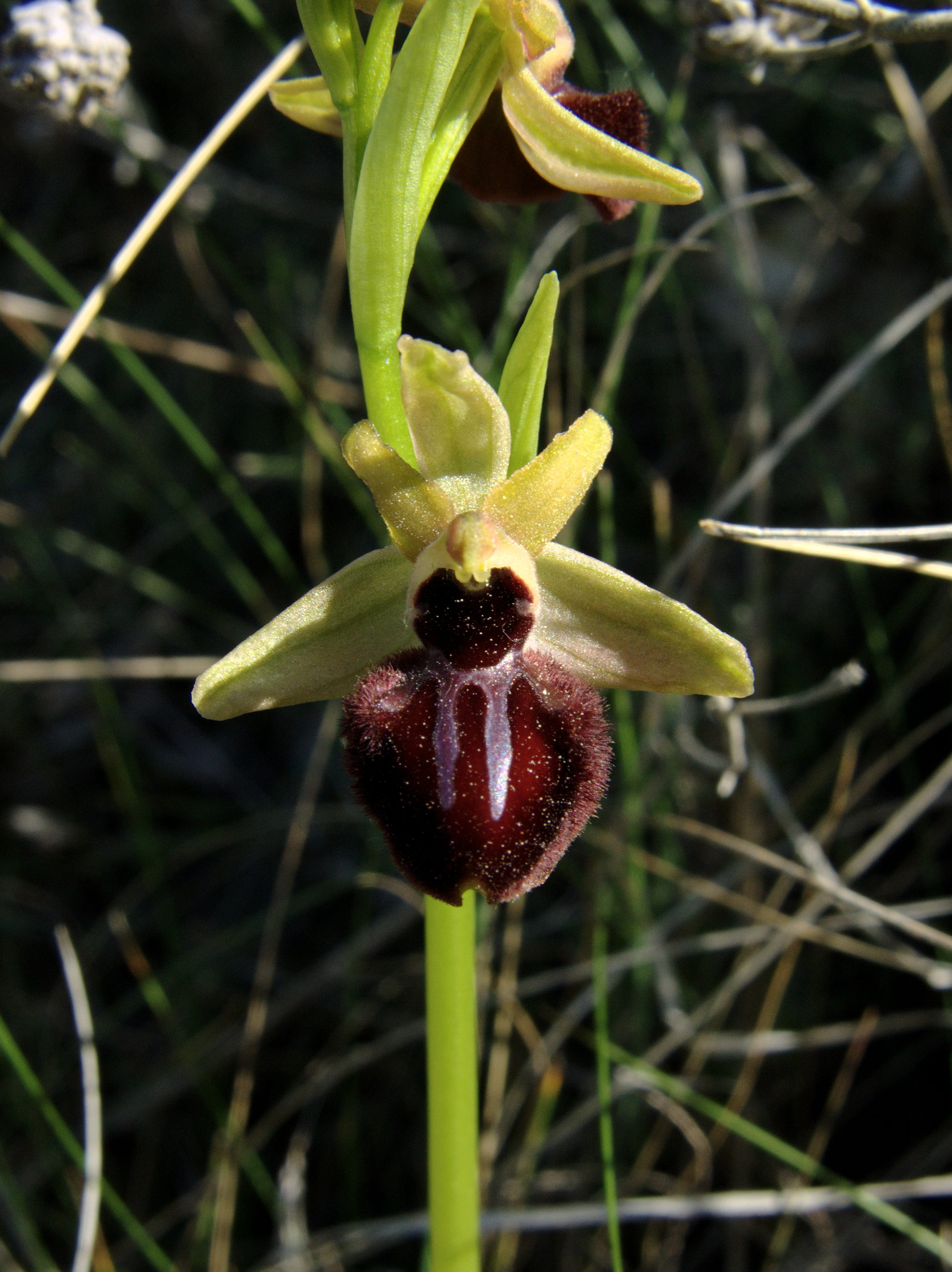 Ophrys sphegodes, (Orchidaceae). Rivas Vaciamadrid, Madrid, España.